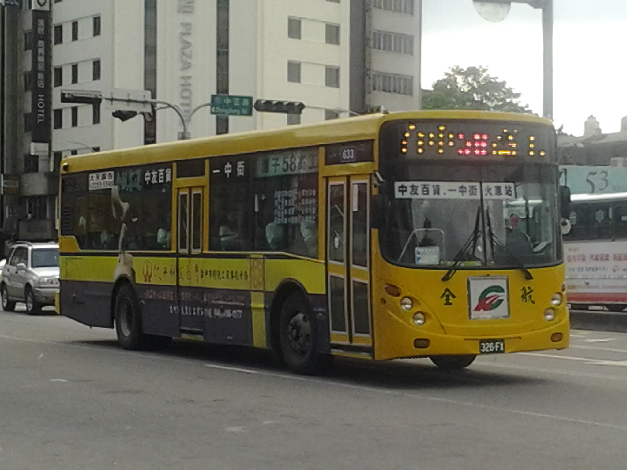 全航客運台中市公車58路